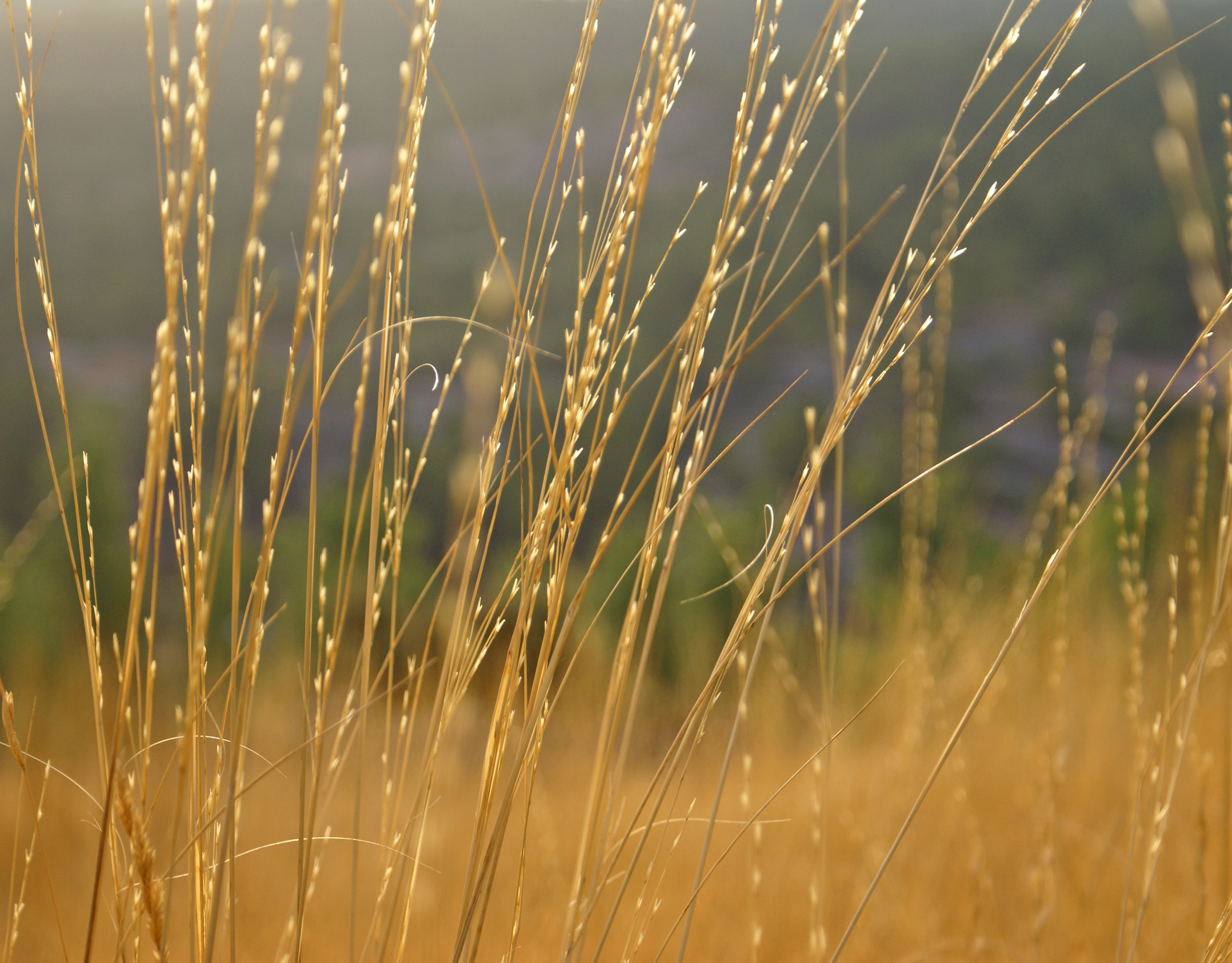 Morning sun